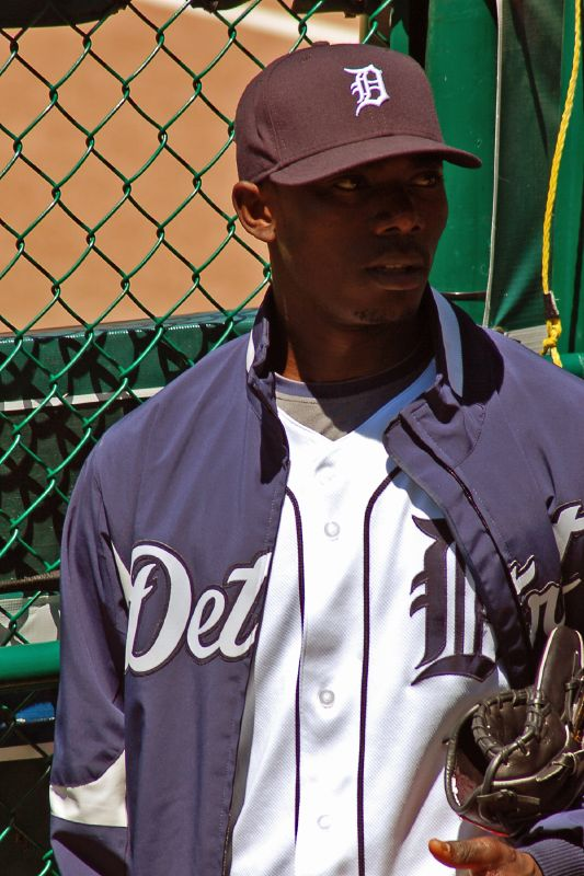 Freddy Dolsi